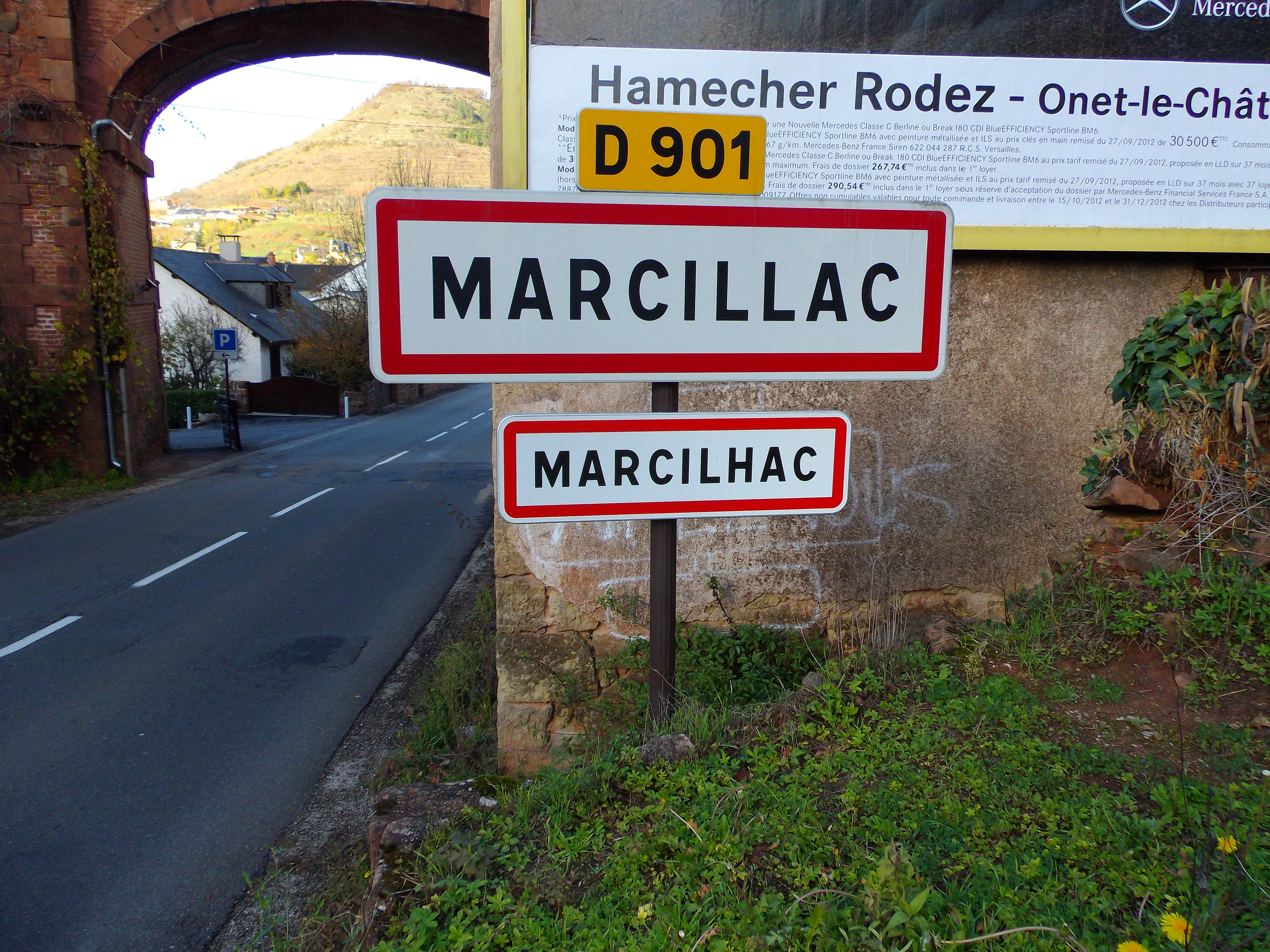 Panneau bilingue français-occitan à l'entrée de Marcillac (Aveyron, France)